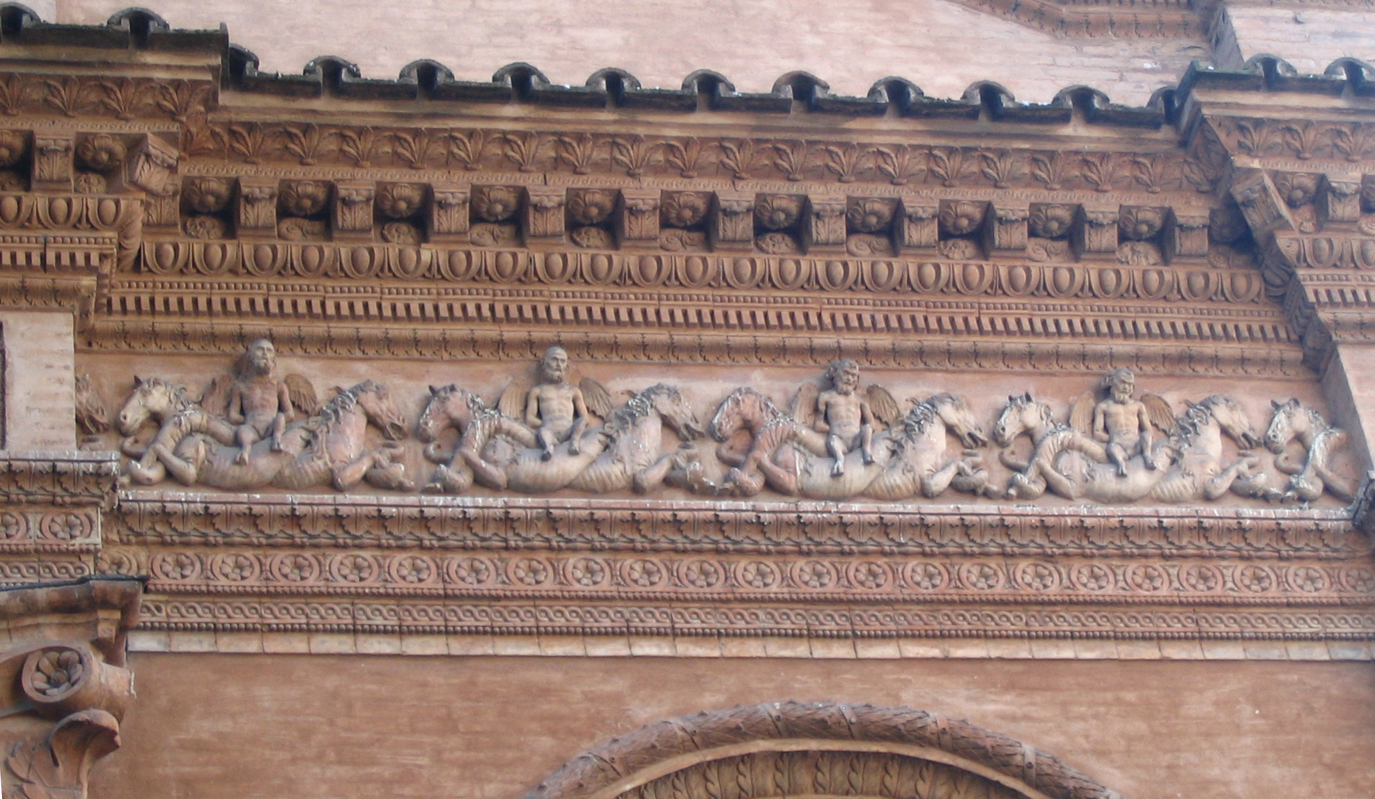 San Pietro, cornice in cotto quattrocentesca sulla facciata.